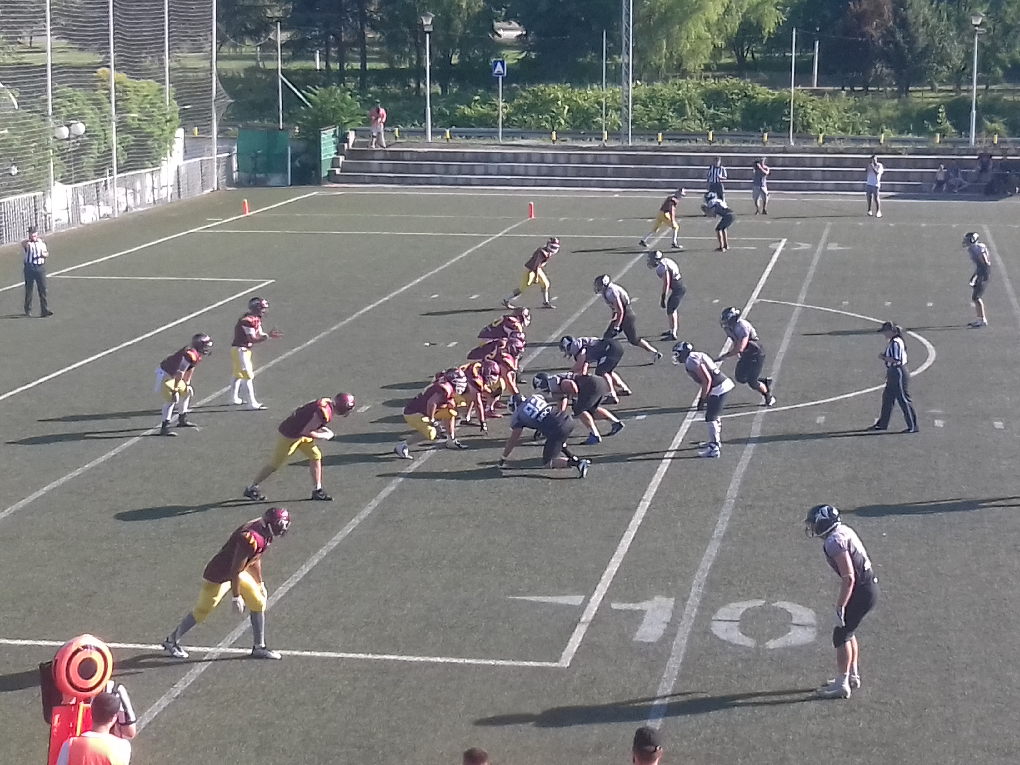 Српски (ћирилица): Сербијан боул 12 (Вукови-Дивљи вепрови)